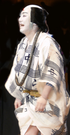 en: Kanzaburō Nakamura XVIII ja: 十八代目中村勘三郎